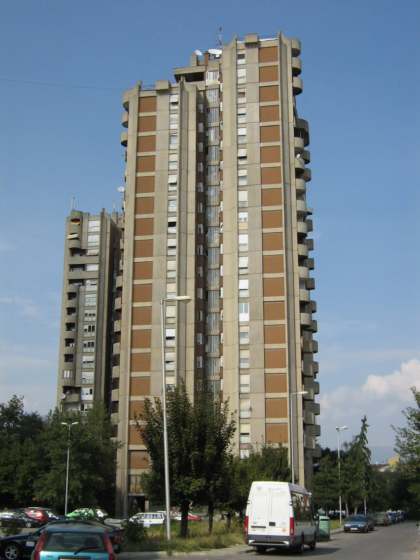 Станбена кула во населба Аеродром, Скопје